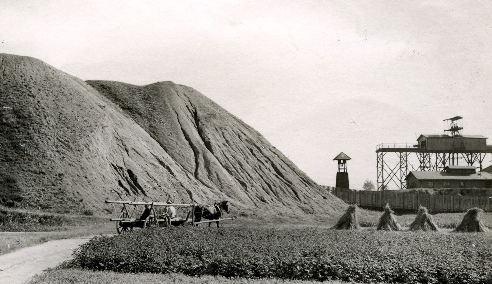 Dzwonnica Gwarków przy hałdzie popłuczkowej w Tarnowskich Górach. Ok. 1940 r.